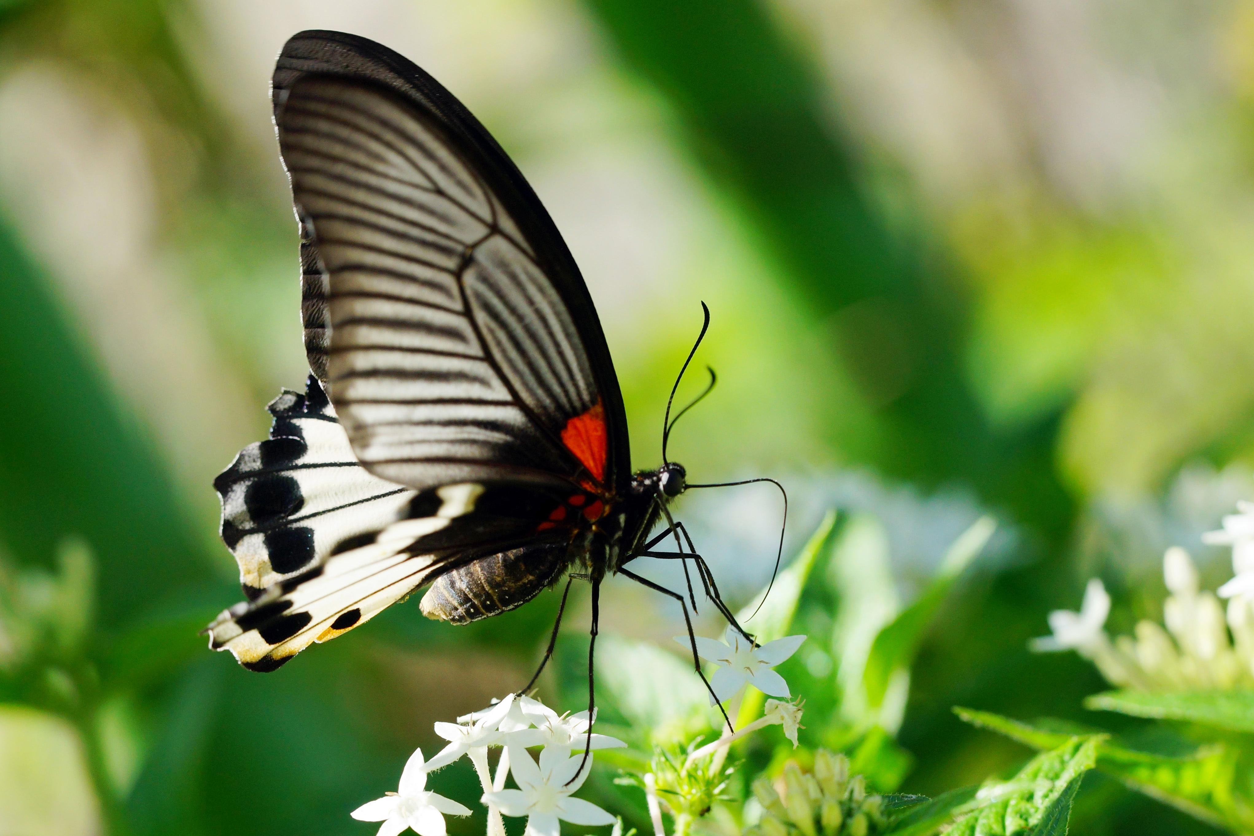 大鳳蝶 Papilio memnon heronus